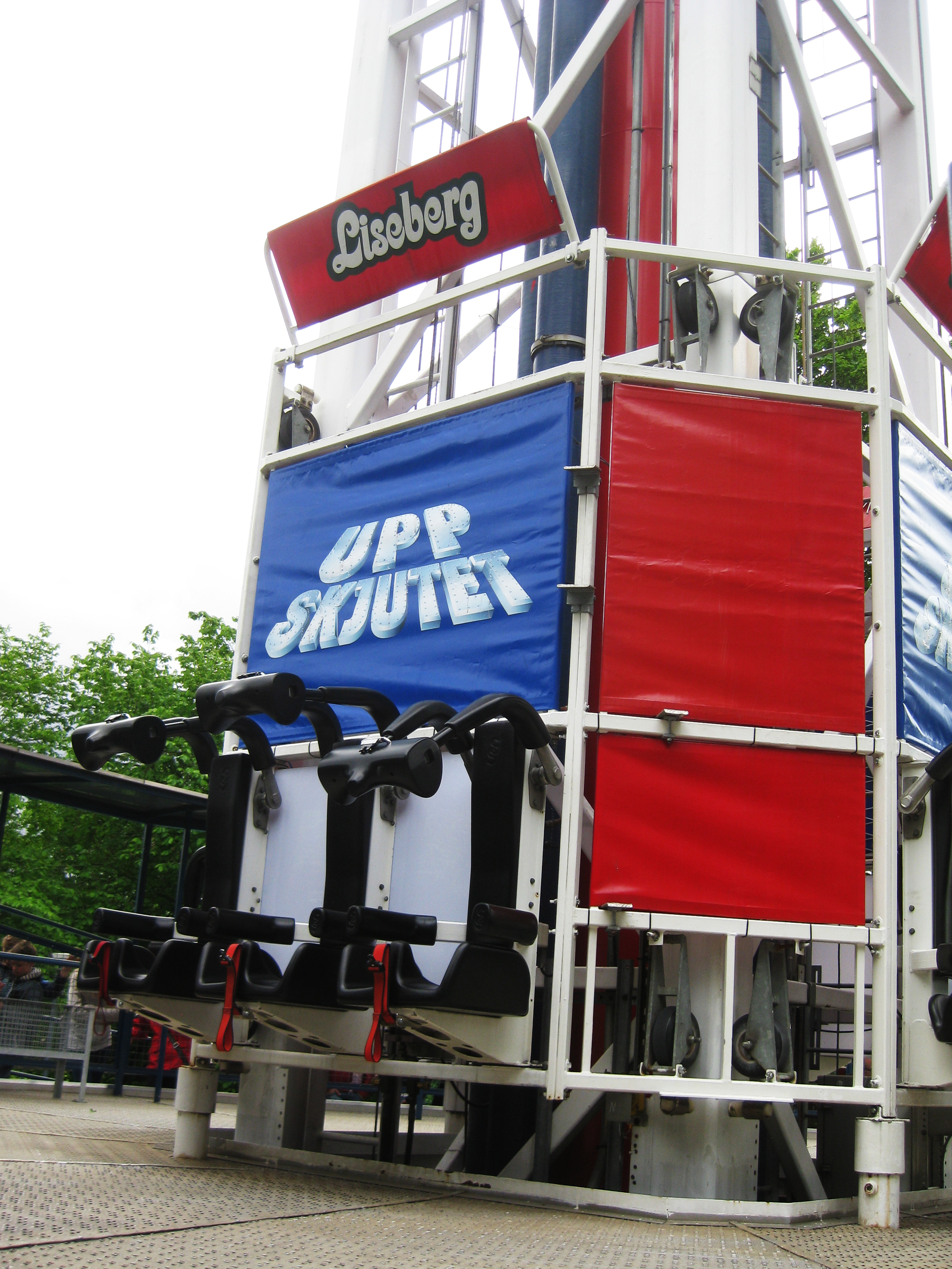 Uppskjutet, Liseberg